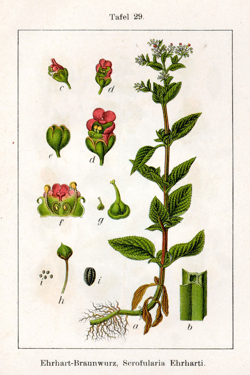 Scrophularia umbrosa subsp. umbrosa, syn. Scrophularia ehrhartii Steven Original Description Ehrhart-Braunwurz, Scrofularia ehrharti